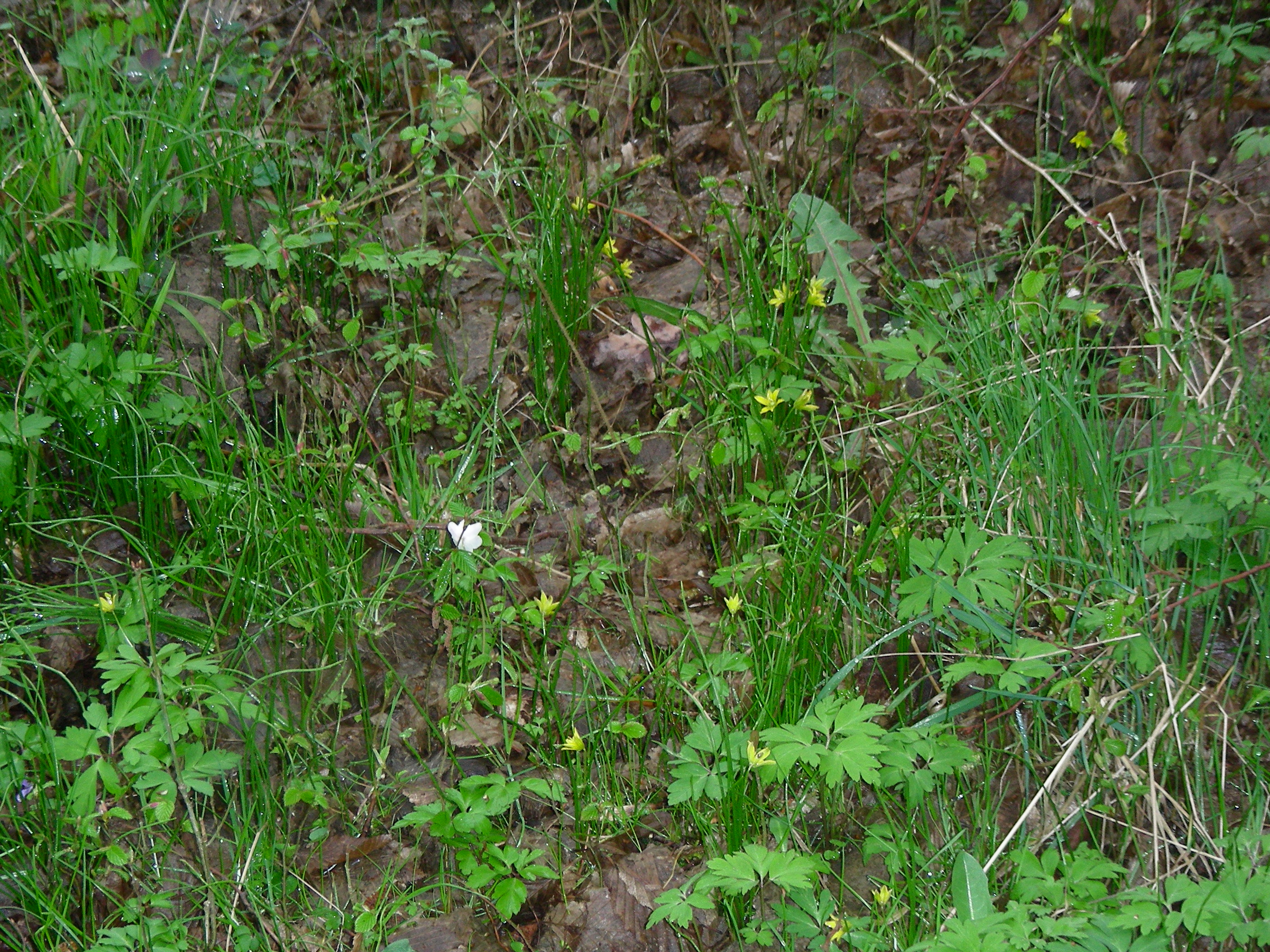 Station dense de Gagea spathacea (Bois des Lanières, La Longueville)